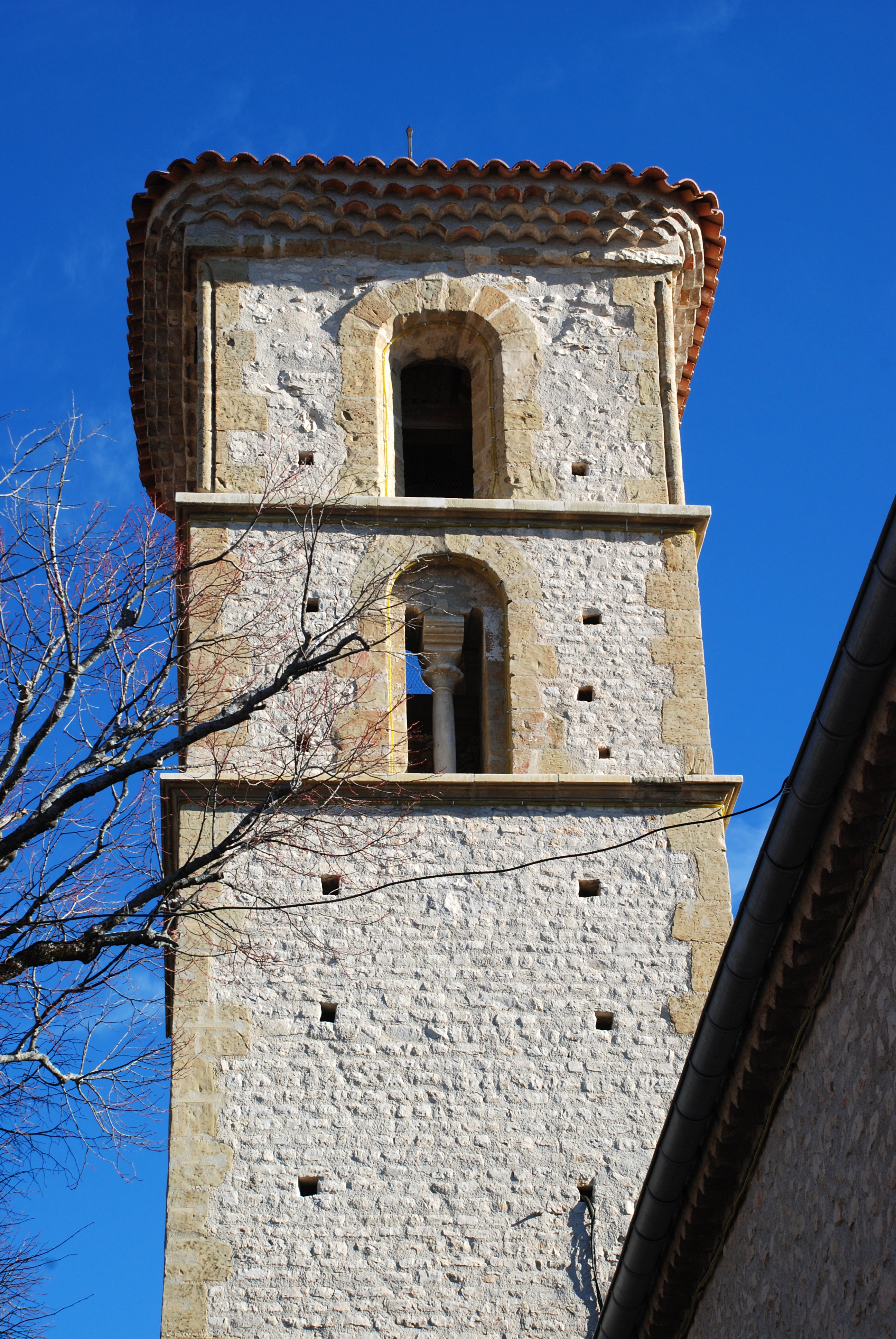 France - Provence - Église Saint-Jean-Baptiste de Mallefougasse